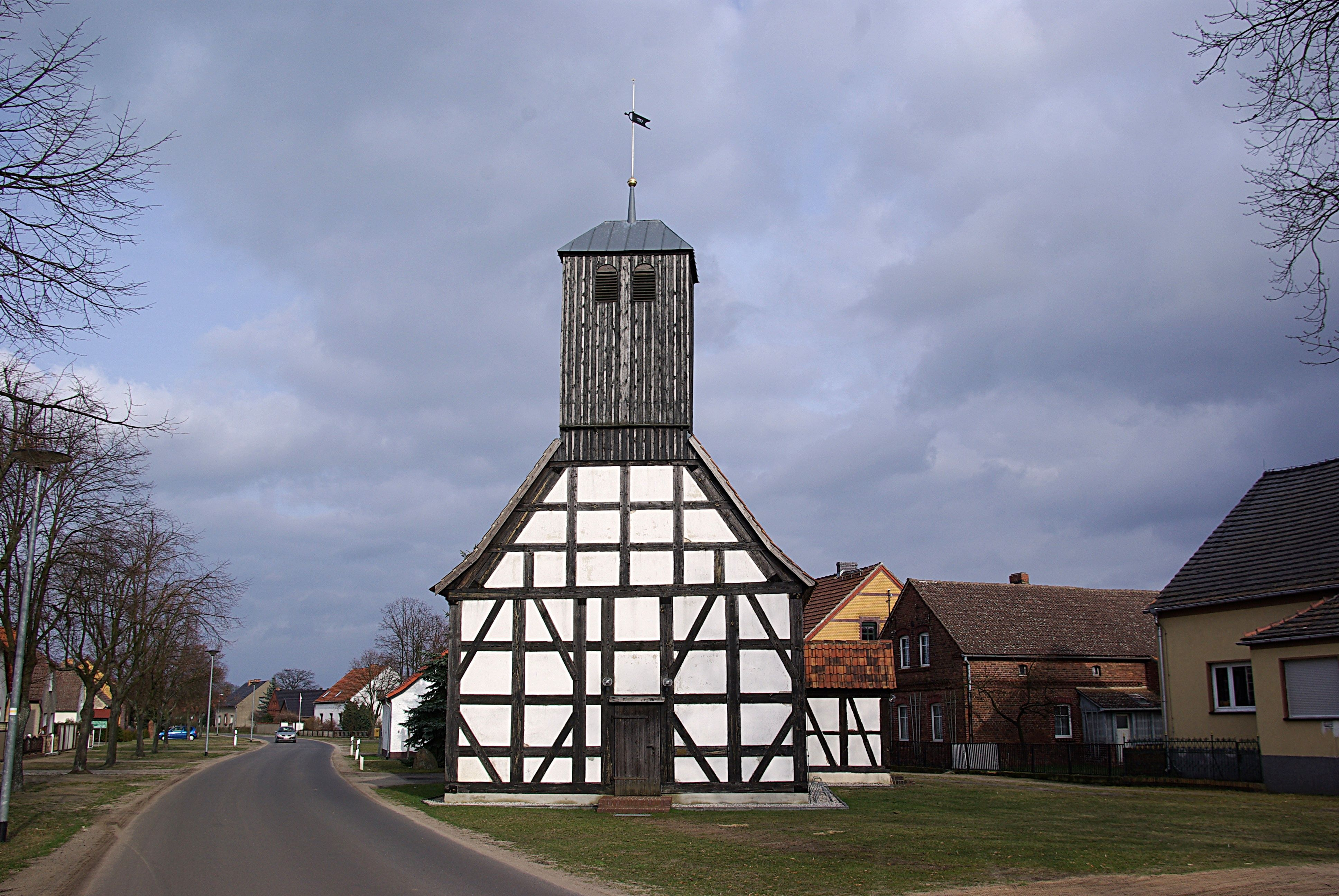 Lübben (Spreewald) in Brandenburg. Die Kirche im Ortsteil Lubolz stammt aus dem 17. Jahrhundert und steht unter Denkmalschutz.